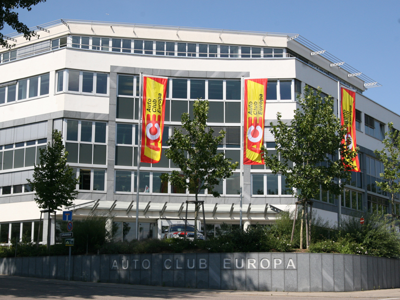 Zentrale des ACE Auto Club Europa in Stuttgart